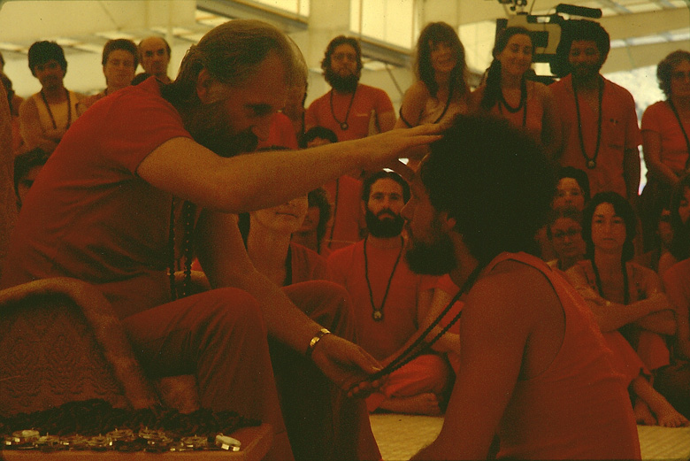 Sannyas-Zeremonie in Rajneeshpuram, Oregon. Ein Schüler wird Sanyasin, und bekommt die Mala überreicht. Das Bild stammt von Gunnar Kossatz, ich habne es freundlicherweise für ihn hochgeladen. --Markus 20:54, 4. Jun. 2008 (CEST)